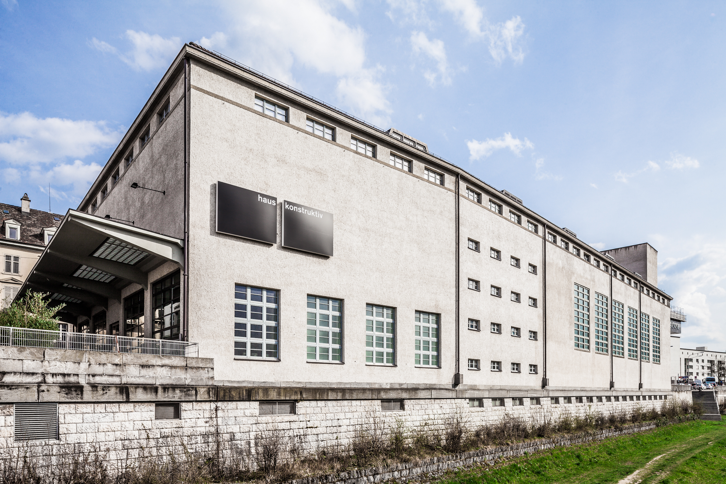 Museum Haus Konstruktiv, Foto: Peter Baracchi